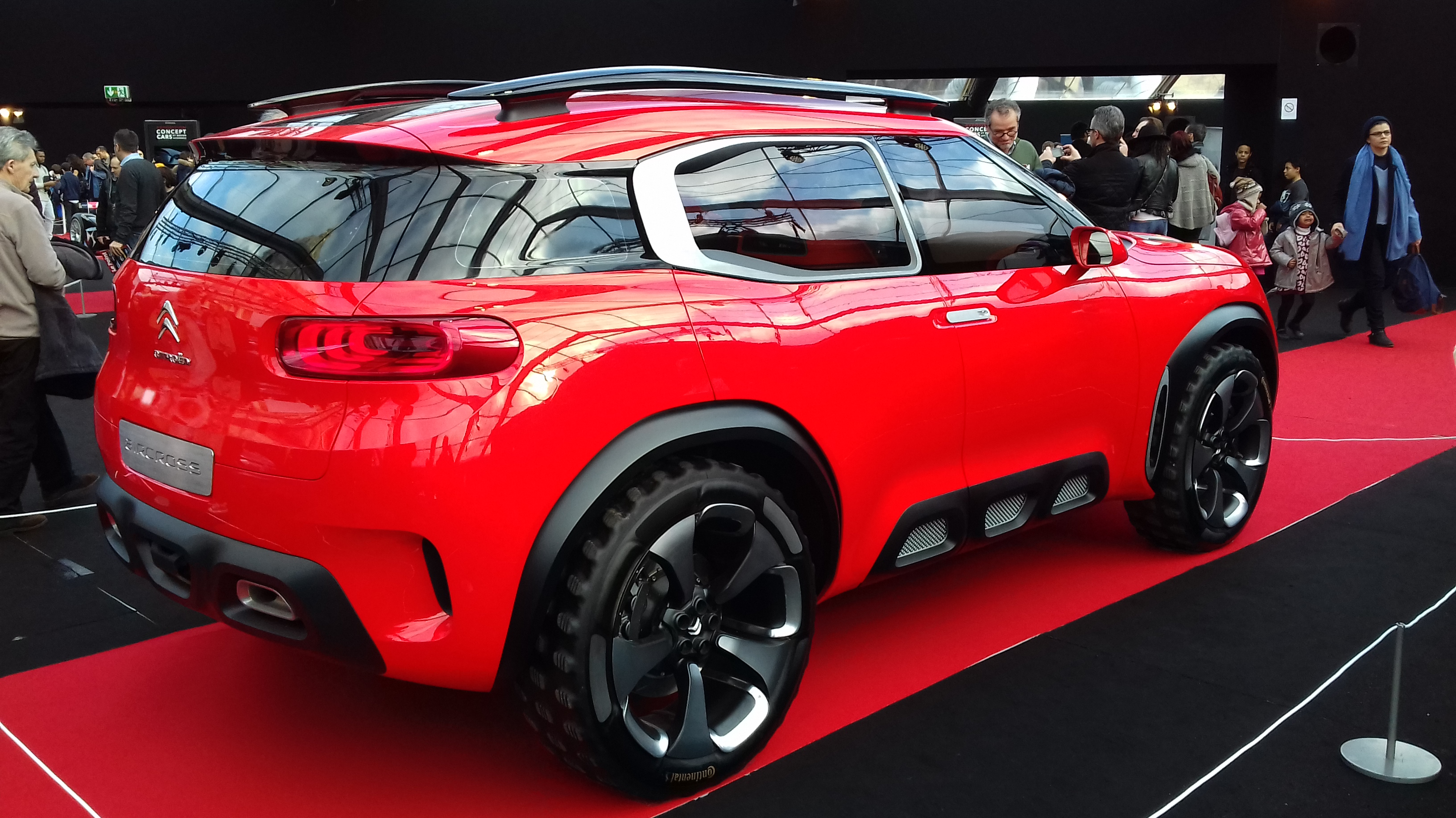 Citroën Aircross au Festival automobile international 2017